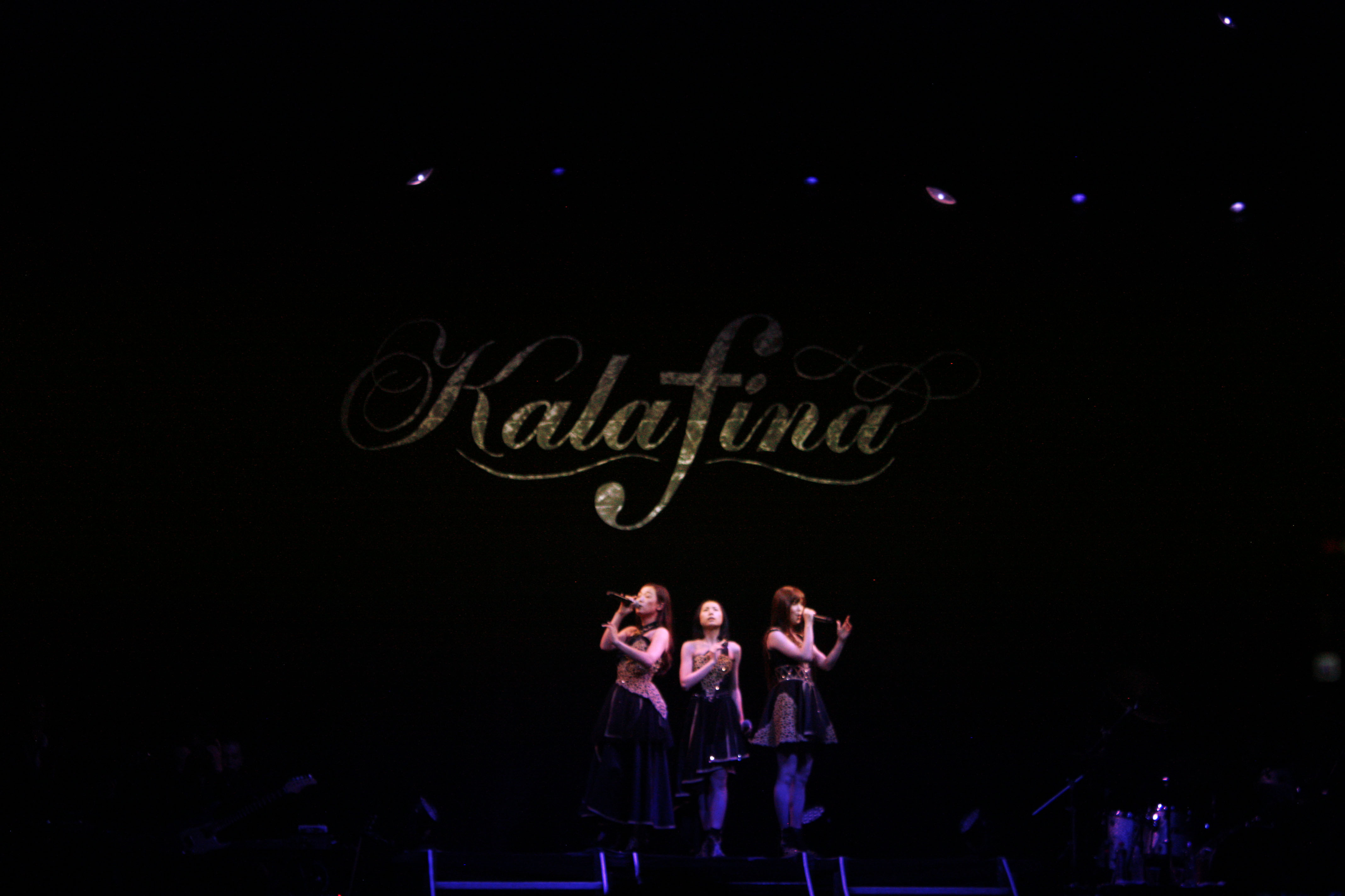 El grupo japonés Kalafina integrado por Hikaru, Keiko y Wakana, presentándose en el Plaza Condesa de la Ciudad de México el pasado 20 de Febrero.